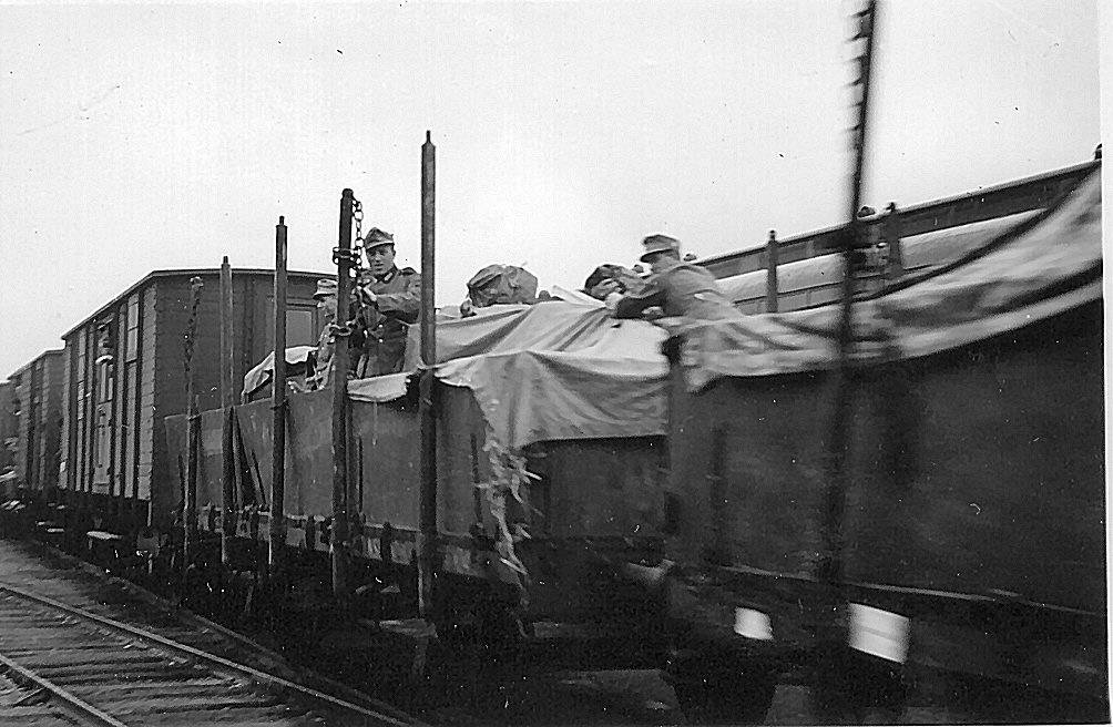 Storlien 1940, German transit traffic, alpine riflemen